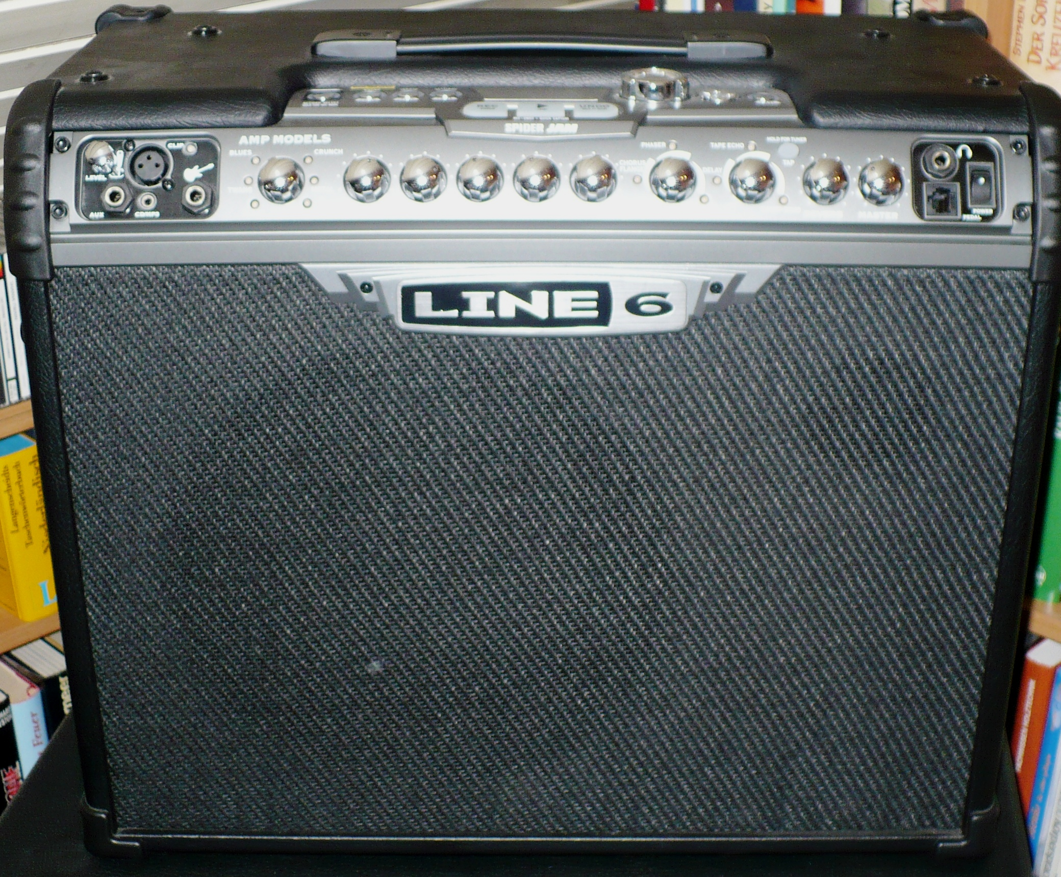 Line6 Spider Jam Gitarren-Combo